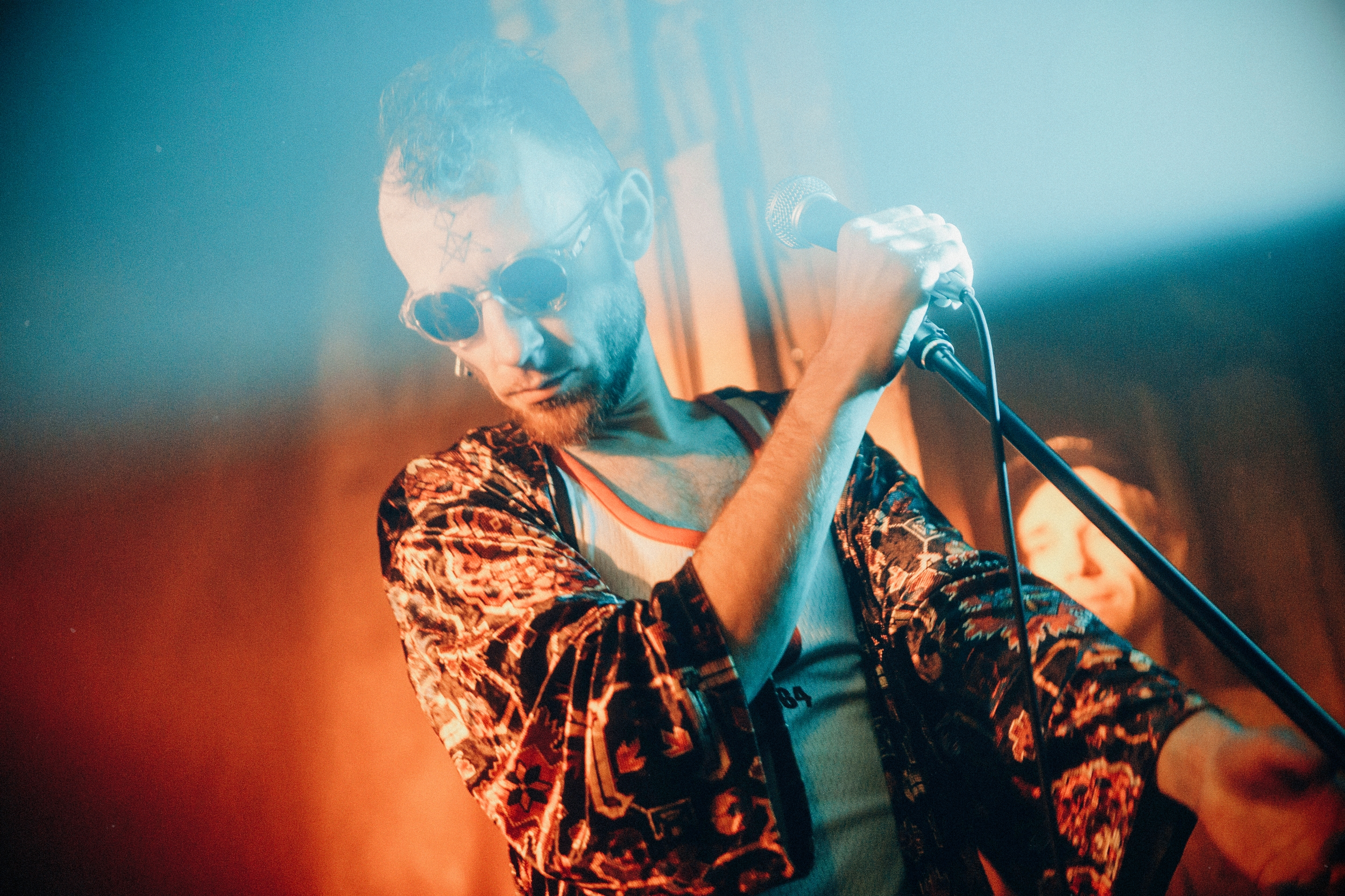 Imants Daksis grupas "The Bubble Gum expLOTION" albuma "SeXpLOTION" prezentācijas koncertā (foto Juris Justs)